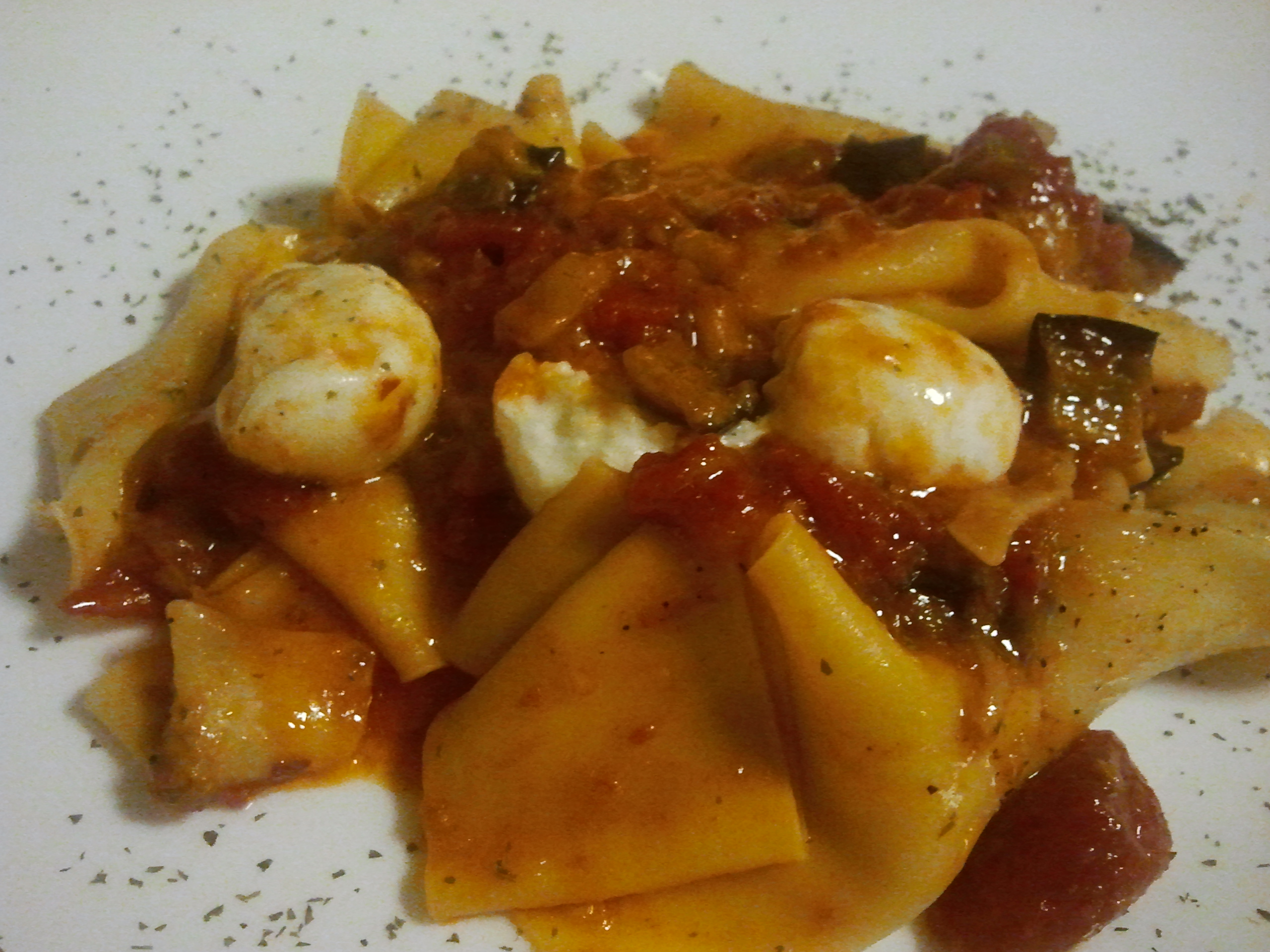 Maltagliati mozzarella e melanzane Villa Caruso Lastra a Signa